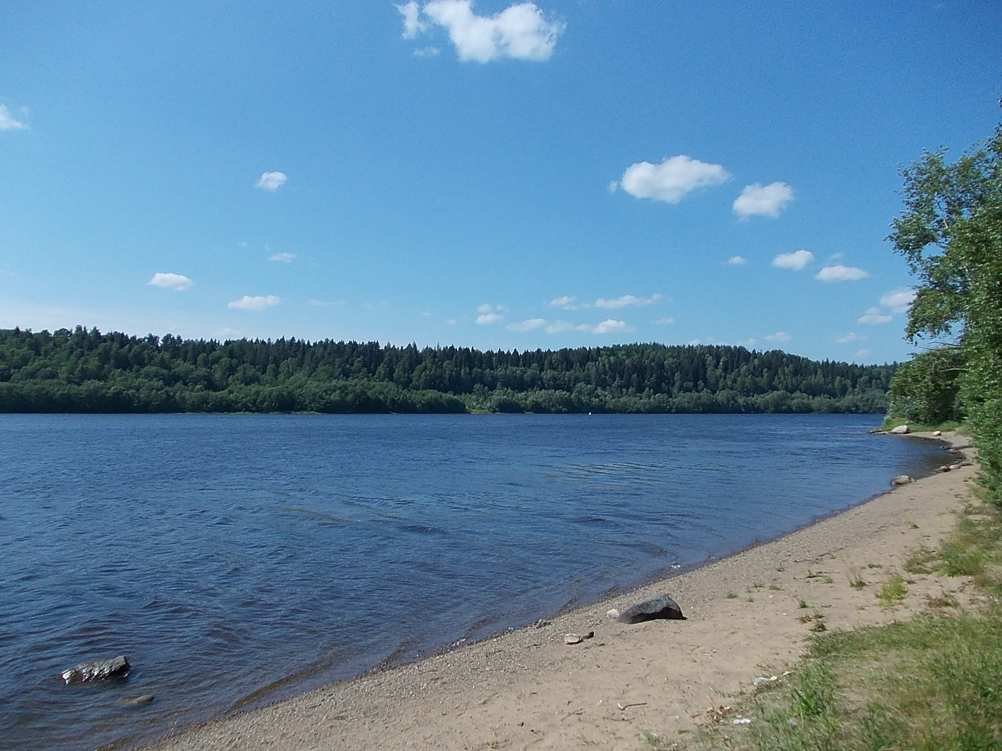 Один из пляжей посёлка.